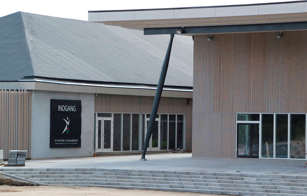 Main entrance to Fyrtårn Tommerup